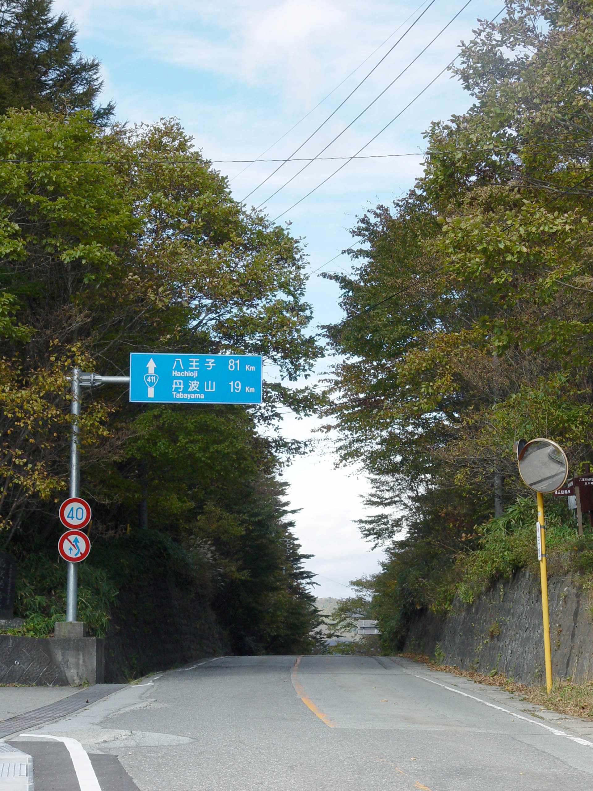 Yanagisawa Pass, Route 411, Kōshū, Yamanashi, Japan柳沢峠、国道411号、甲州市